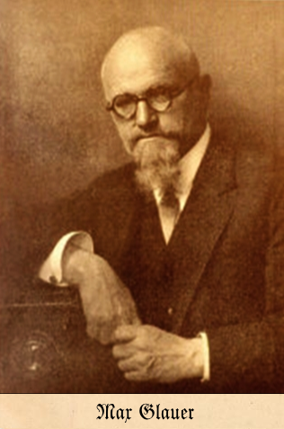 Max Glauer (1867-1935) war ein schlesischer Fotograf.